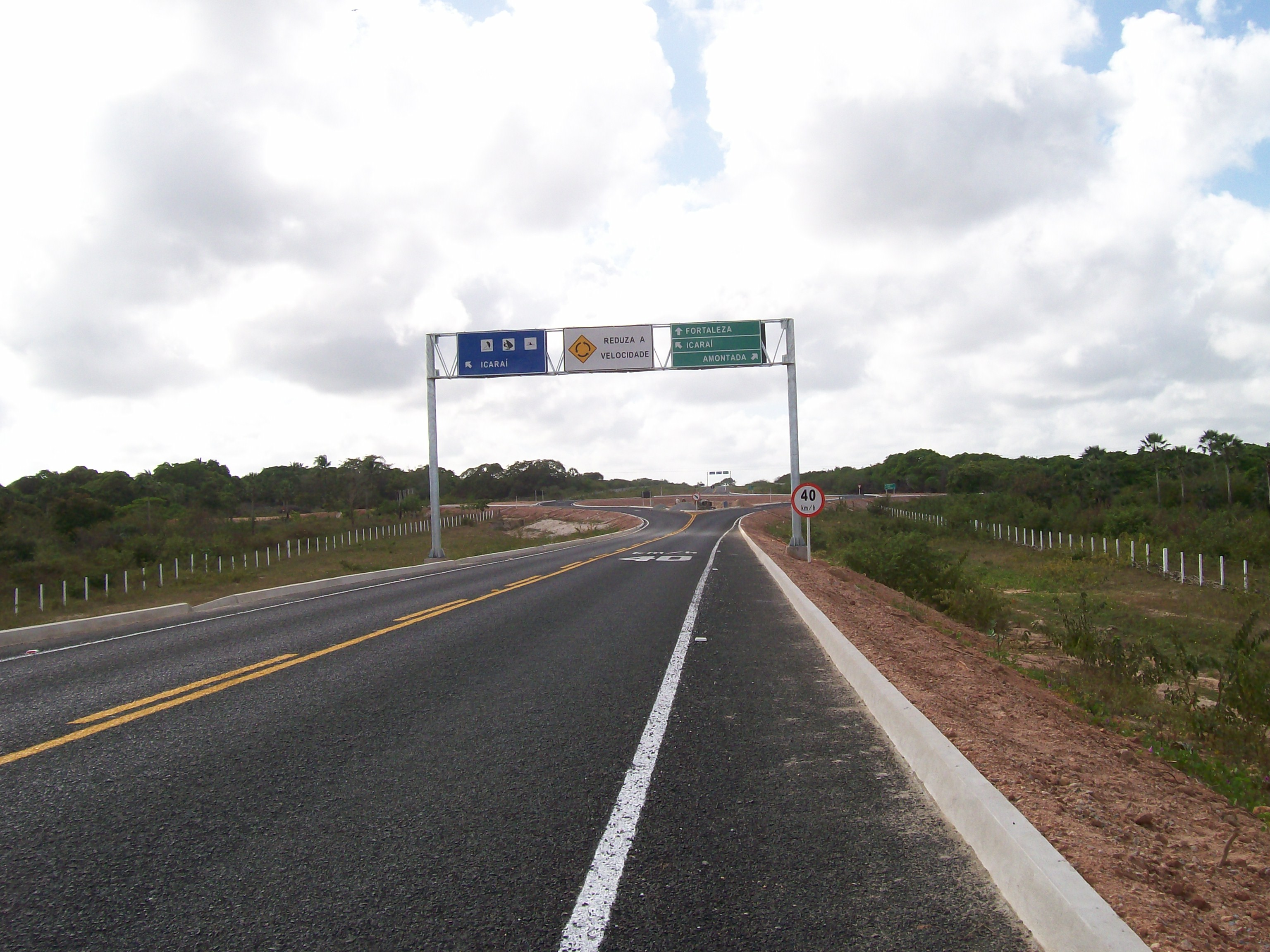 Estrada nova do Sol Poente, cruzamento Amontada à Praia do Icaraísinho